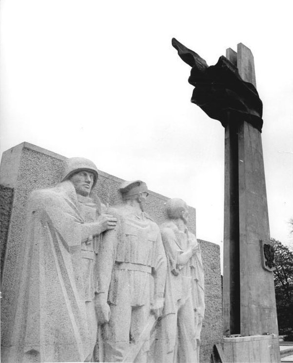 ADN-ZB-Kutscher-8.5.72-Berlin: Denkmal der deutsch-polnischen Freundschaft. Dieses Denkmal das den gemeinsamen Kampf polnischer Soldaten und deutscher Antifaschisten im II.Weltkrieg symolisiert wird in wenigen Tagen im Volkspark Friedrichshain der Hauptstadt feierlich der Öffentlichkeit übergeben.